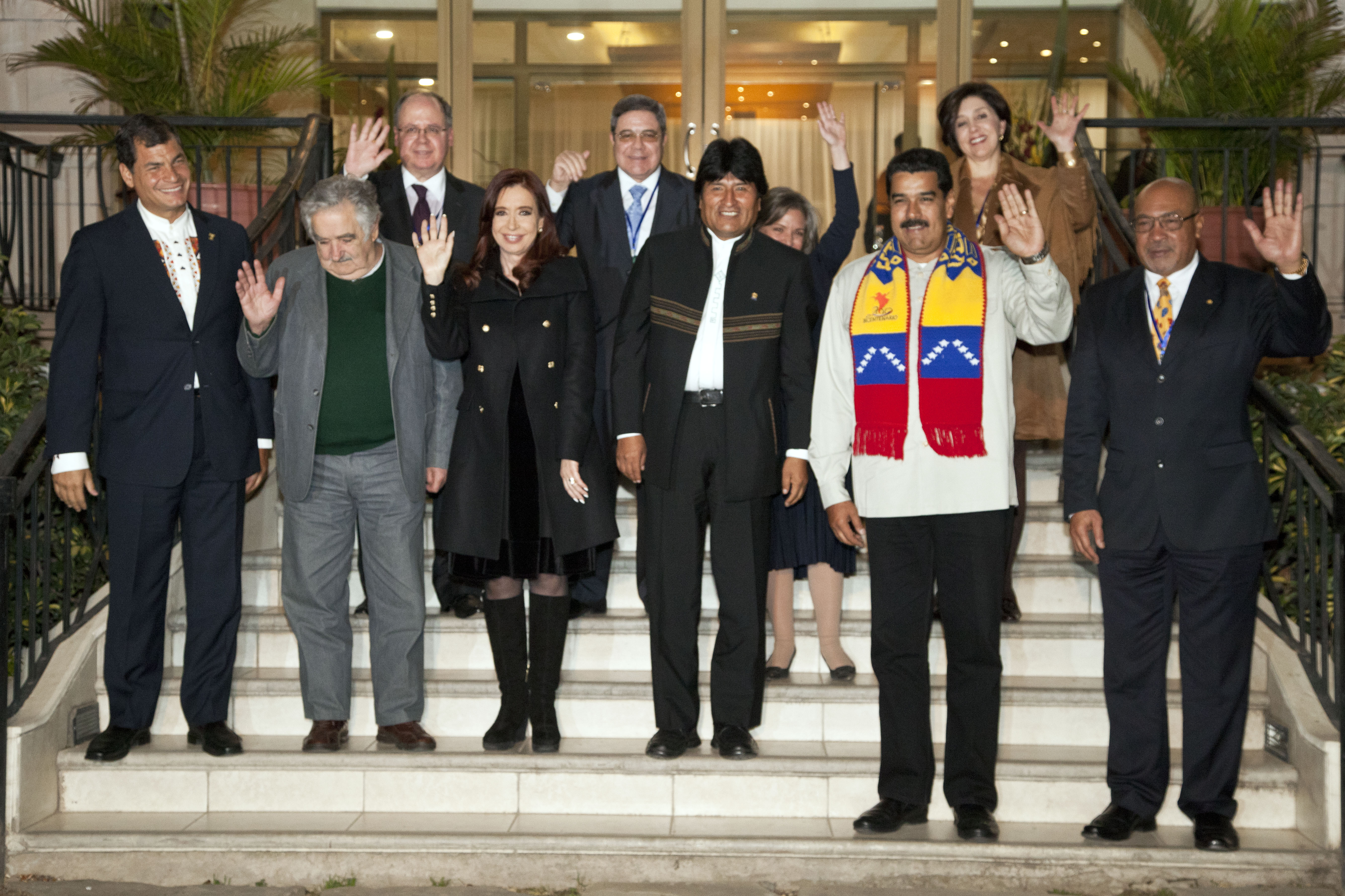 Cochabamba (Bolivia), 4 de julio 2013. Las Jefas y Jefes de Estado y de Gobierno de los países de la Unión de Naciones Suramericanas (UNASUR) ante la grave situación a la que fue sometida el Presidente de Bolivia por parte de Francia, Portugal, Italia y España, suscribieron este jueves 4 de julio la Declaración de Cochabamba la cual establece que la inaceptable restricción a la libertad del Presidente Evo Morales. Foto: Fernanda LeMarie - Cancillería del Ecuador.